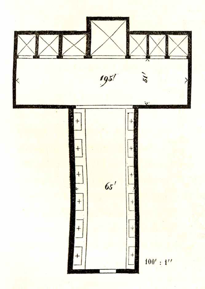 Holzschnitt aus den Mittheilungen der kaiserl. königl. Central-Commission zur Erforschung und Erhaltung der Baudenkmale Band 5, 1860. Beitrag von Wilhelm Lübke mit dem Titel: „Reisenotizen über die mittelalterlichen Kunstwerke in Italien“, 1858/1859, gemeinsam mit Karl Schnaase Druck: k. k. Hof- und Staatsdruckerei Zuordnung der Zeichnungen entsprechend dem Dateinamen